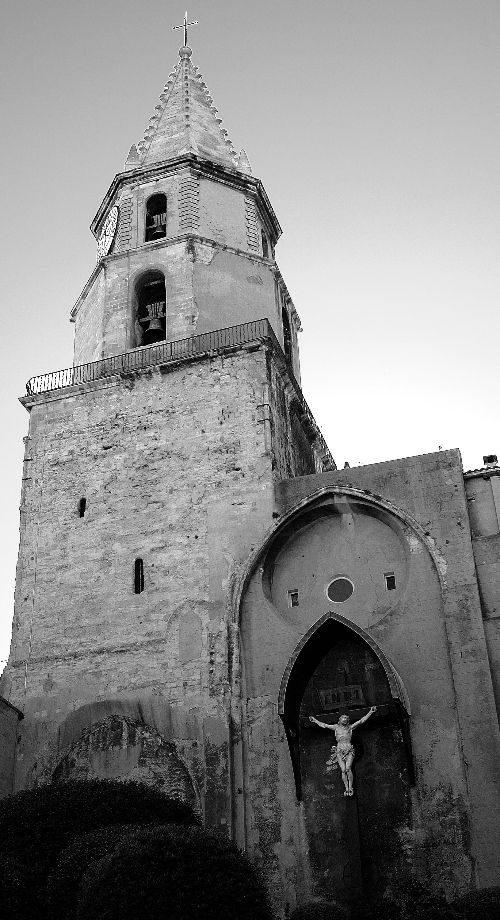 Clocher de l'ancienne église des Accoules à Marseille. Photo prise par Christophe MOUSTIER - 2005